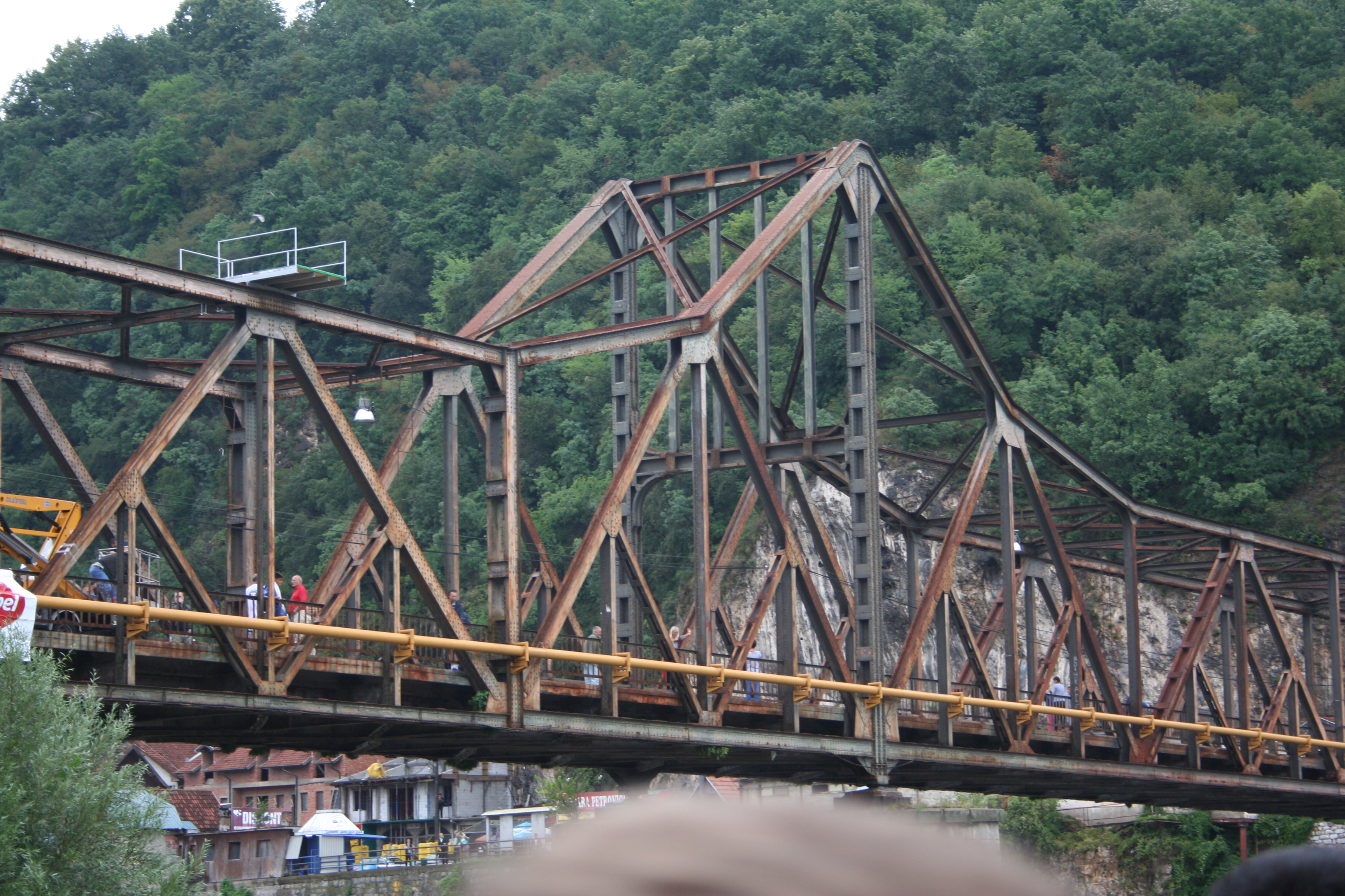 Most kralja Aleksandra I Karađorđevića na Drini, između Malog Zvornika i Zvornika u Republici Srpskoj